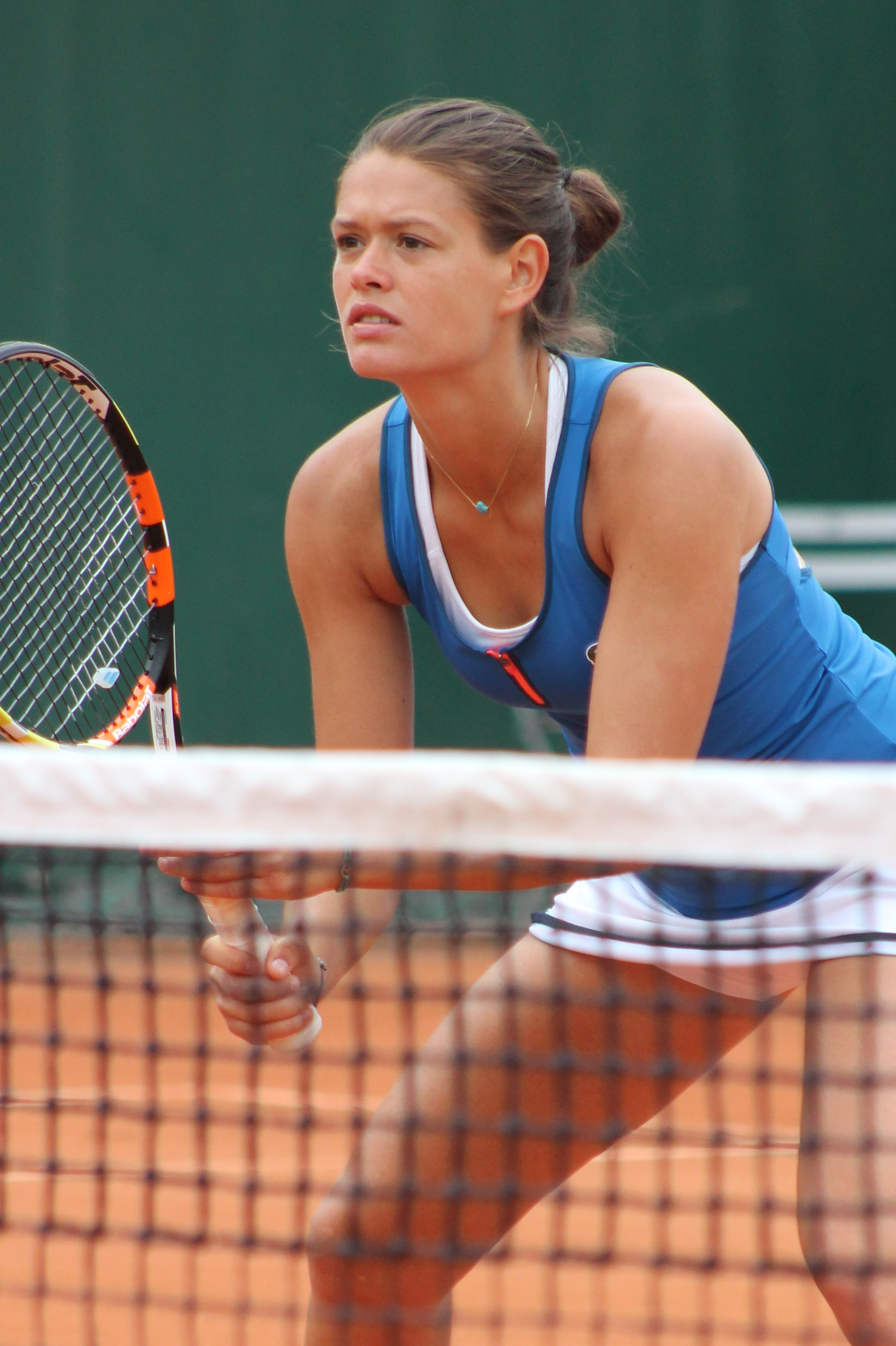 Paquet RG15